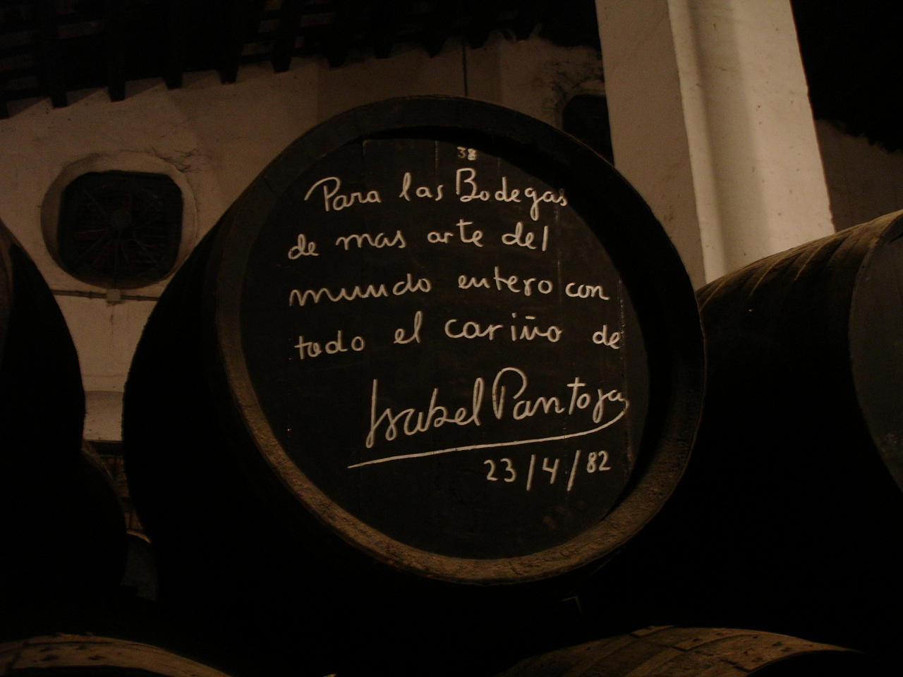 Barril de Jerez firmado por La Pantojja